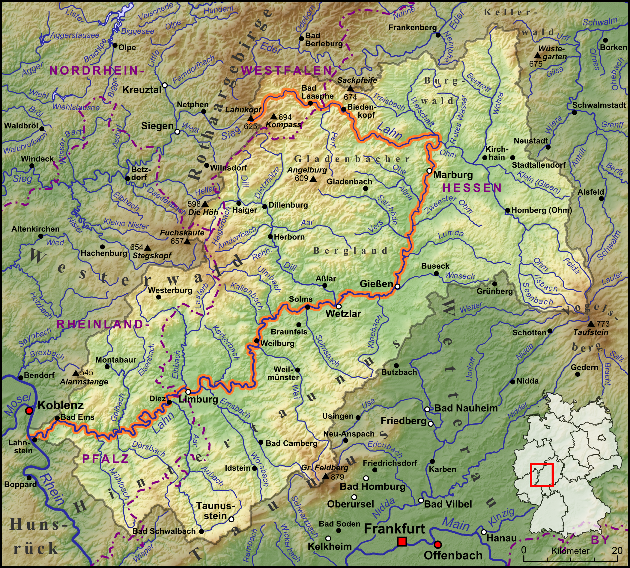 Die Lahn, ihre Nebenflüsse und das Wassereinzugsgebiet begrenzt durch die Wasserscheiden